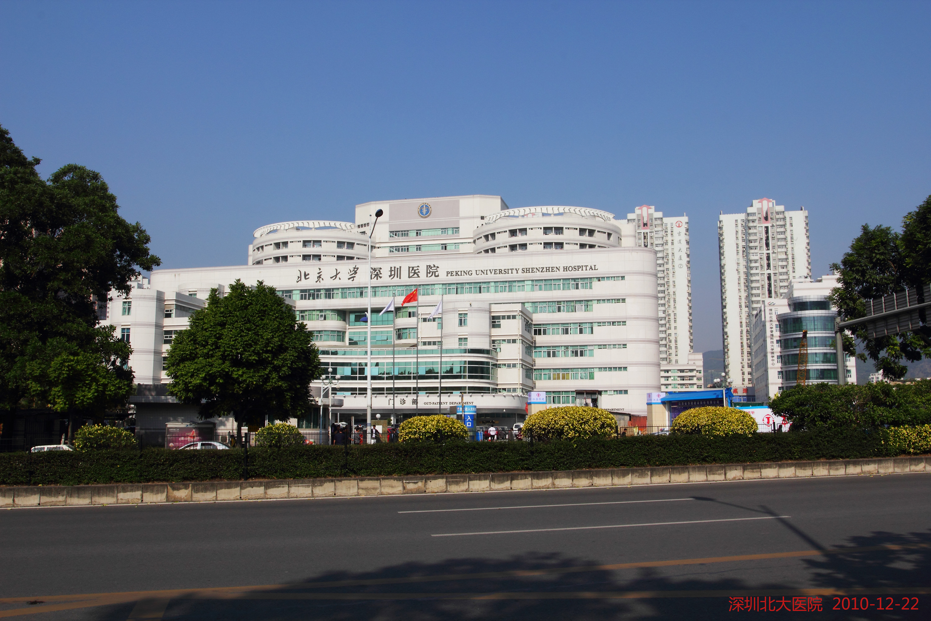 深圳北大医院 Bei Da Yi Yuan (Hospital)